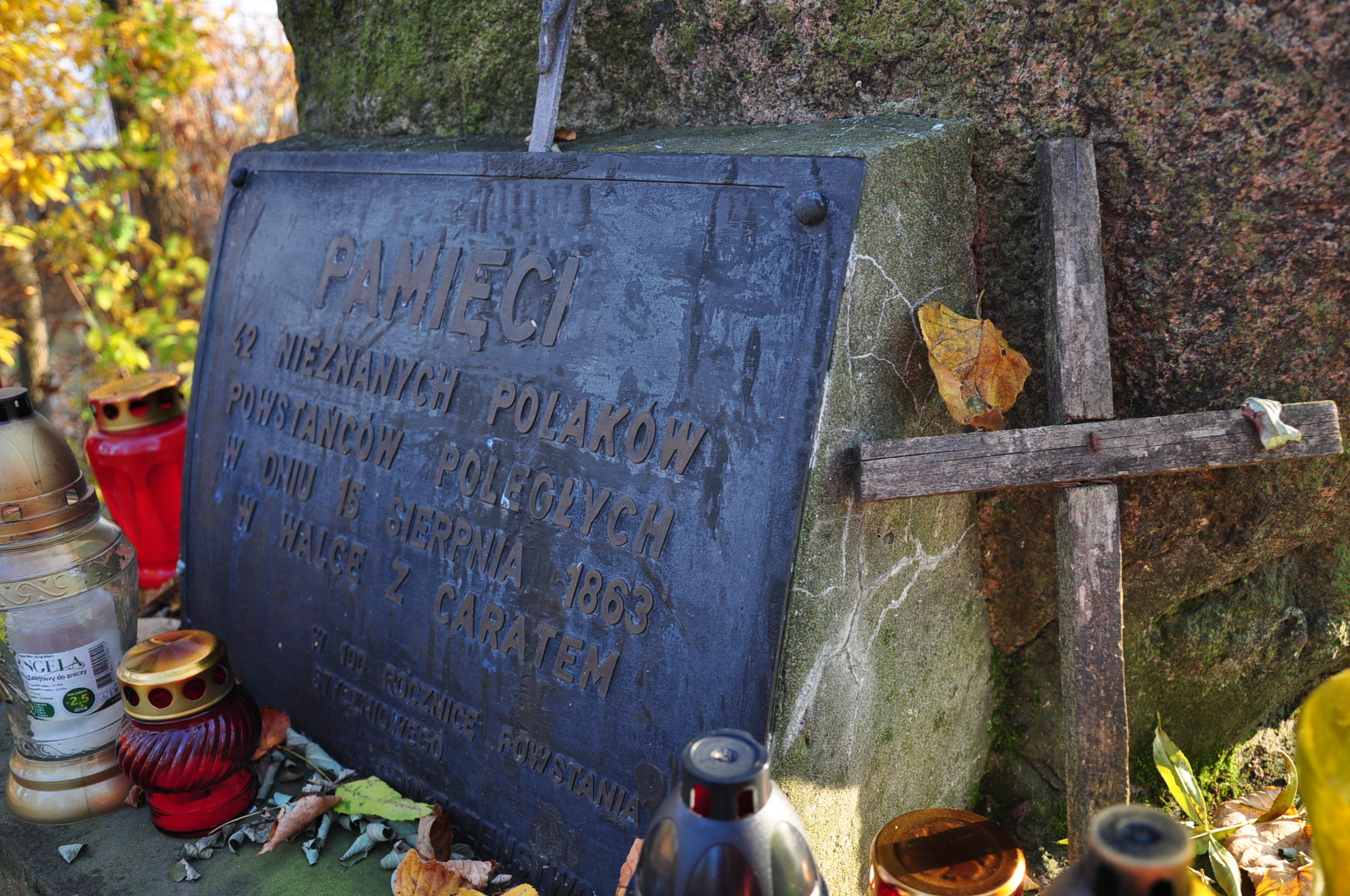 Mogiła 42 uczestników powstania styczniowego na cmentarzu w Imbramowicach.